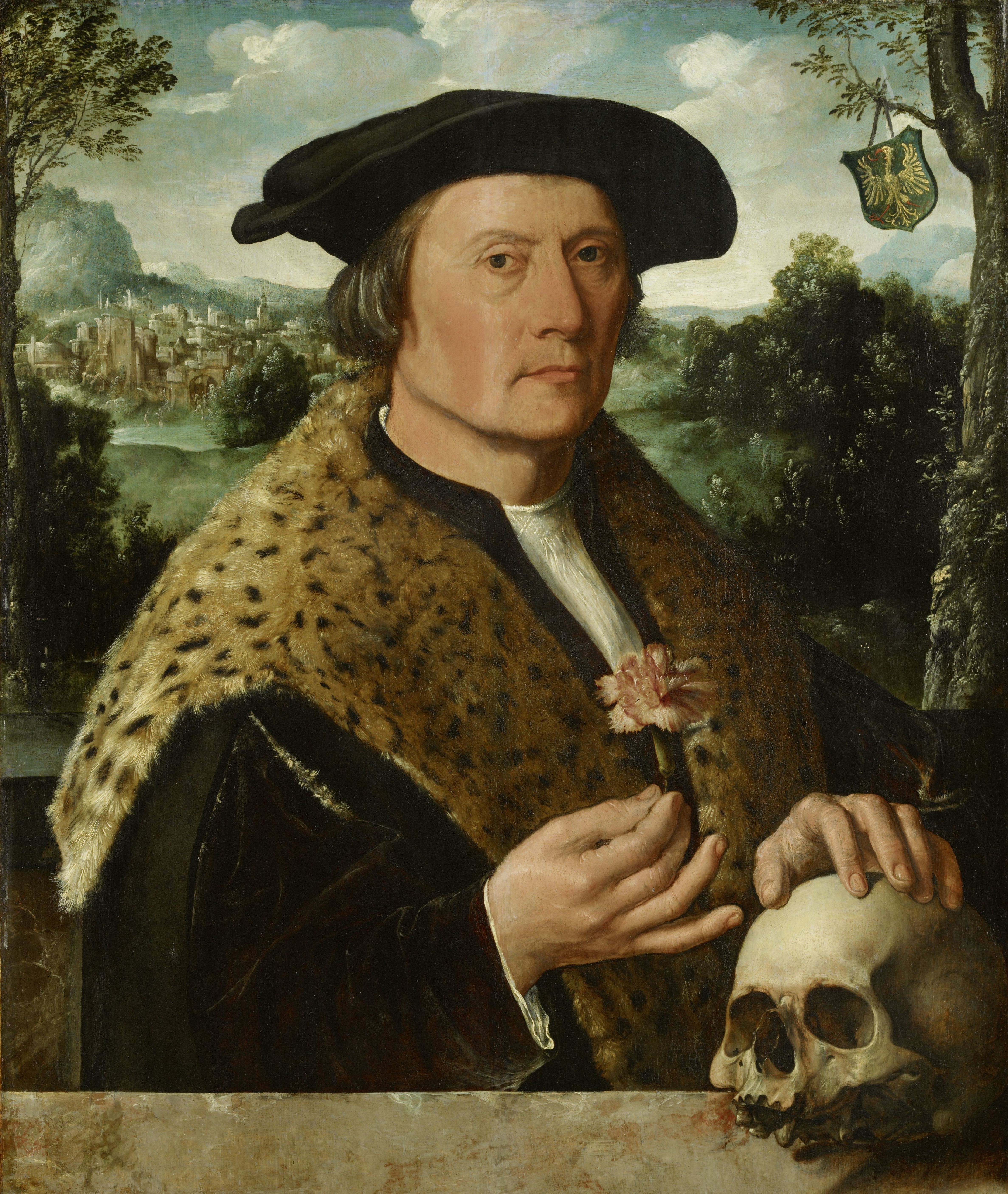 Portret van Pompeius Occo, bankier, koopman en humanist in Amsterdam. Ten halven lijve, achter een balustrade, een anjer in de rechterhand, de linkerhand rustend op een schedel. Op de achtergrond een bergachtig landschap. Gekleed in een mantel met bontkraag, op het hoofd een baret. Het familiewapen hangt rechts aan de tak van een boom.